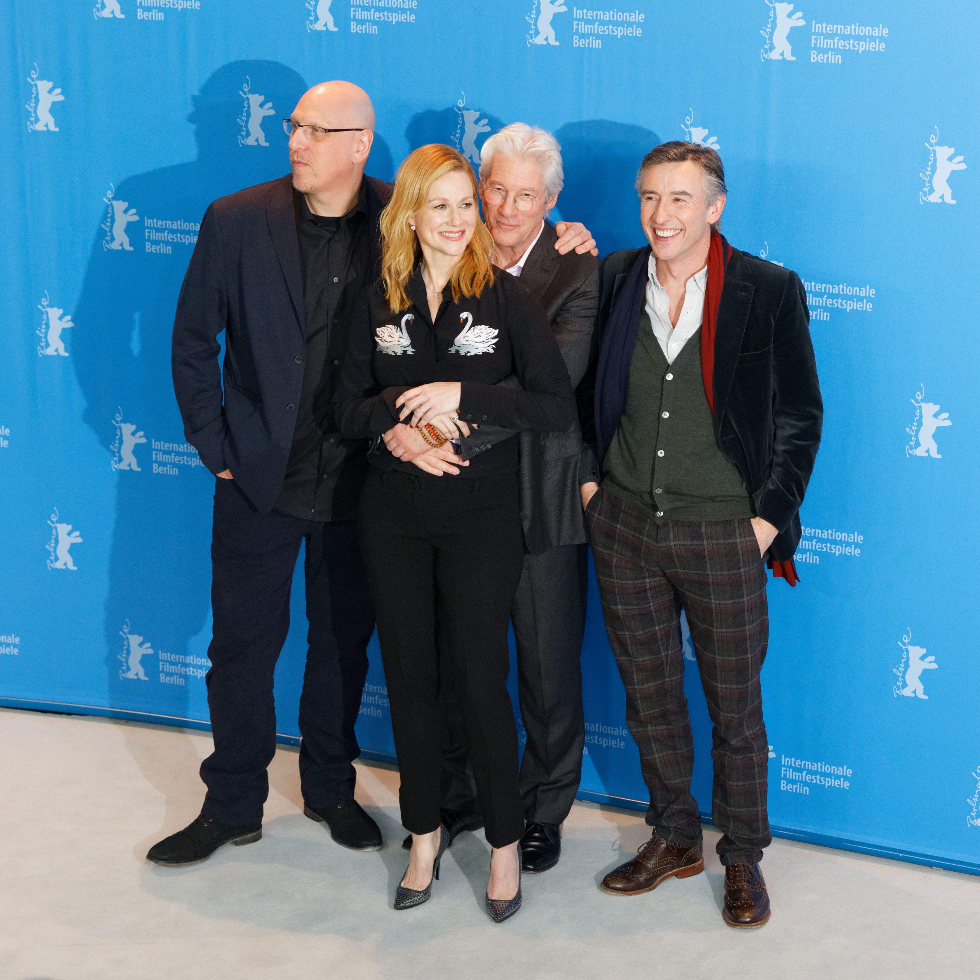 Oren Moverman & Cast von The Dinner bei der Berlinale 2017